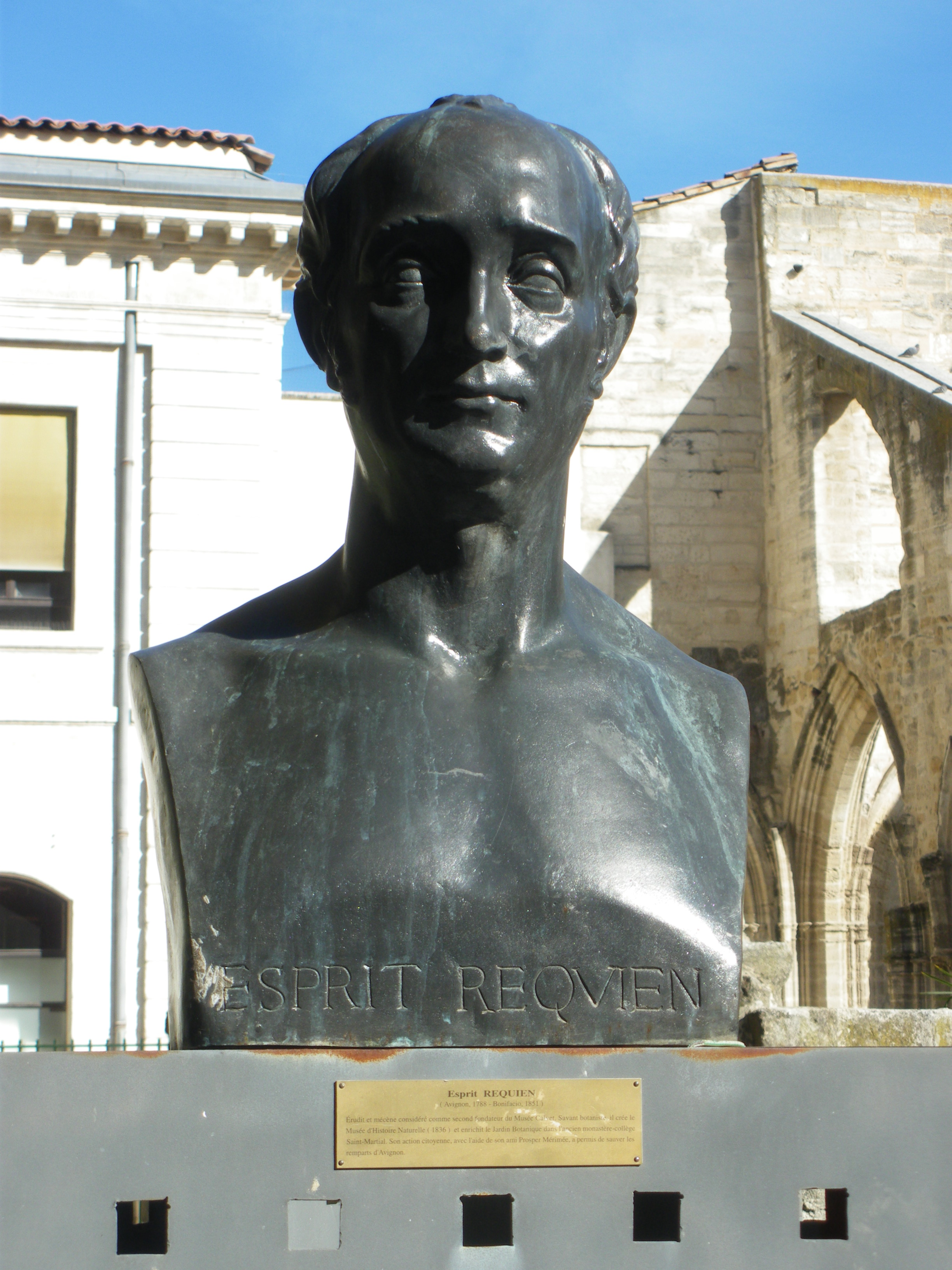 Buste d'Esprit Requien, Avignon, Vaucluse, France